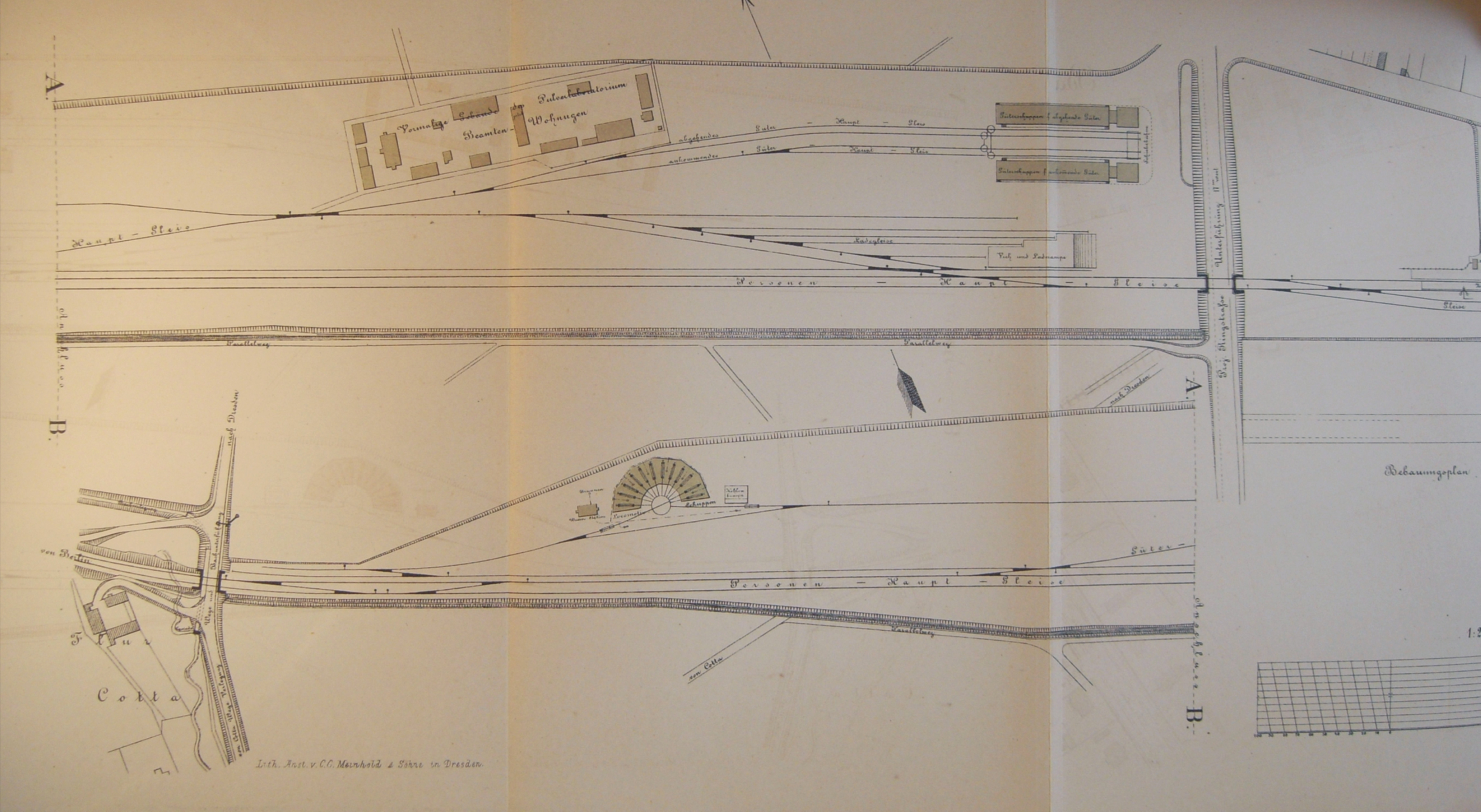 Lageplan des Friedrichstädter Bahnhofs, Teil Güterbahnhof